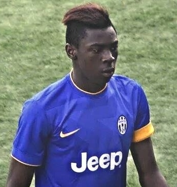 Accademia del Calcio "Adolfo De Cecco" a Poggio degli Ulivi, Città Sant'Angelo (PE). Il calciatore italiano Moise Bioty Kean in azione nelle giovanili della Juventus, nel corso della vittoriosa sfida contro il Monteruscello (5-0) valevole per la Nike Premier Cup 2015.